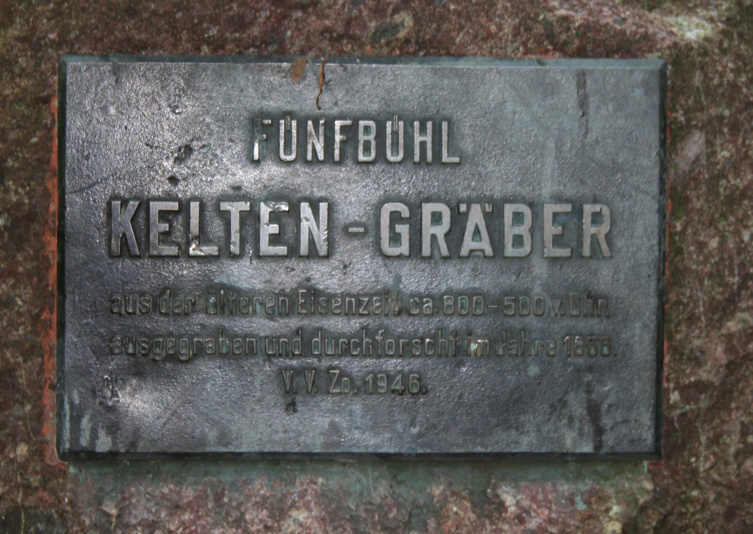 Tafel bei den Keltengräbern im Zollikerberg